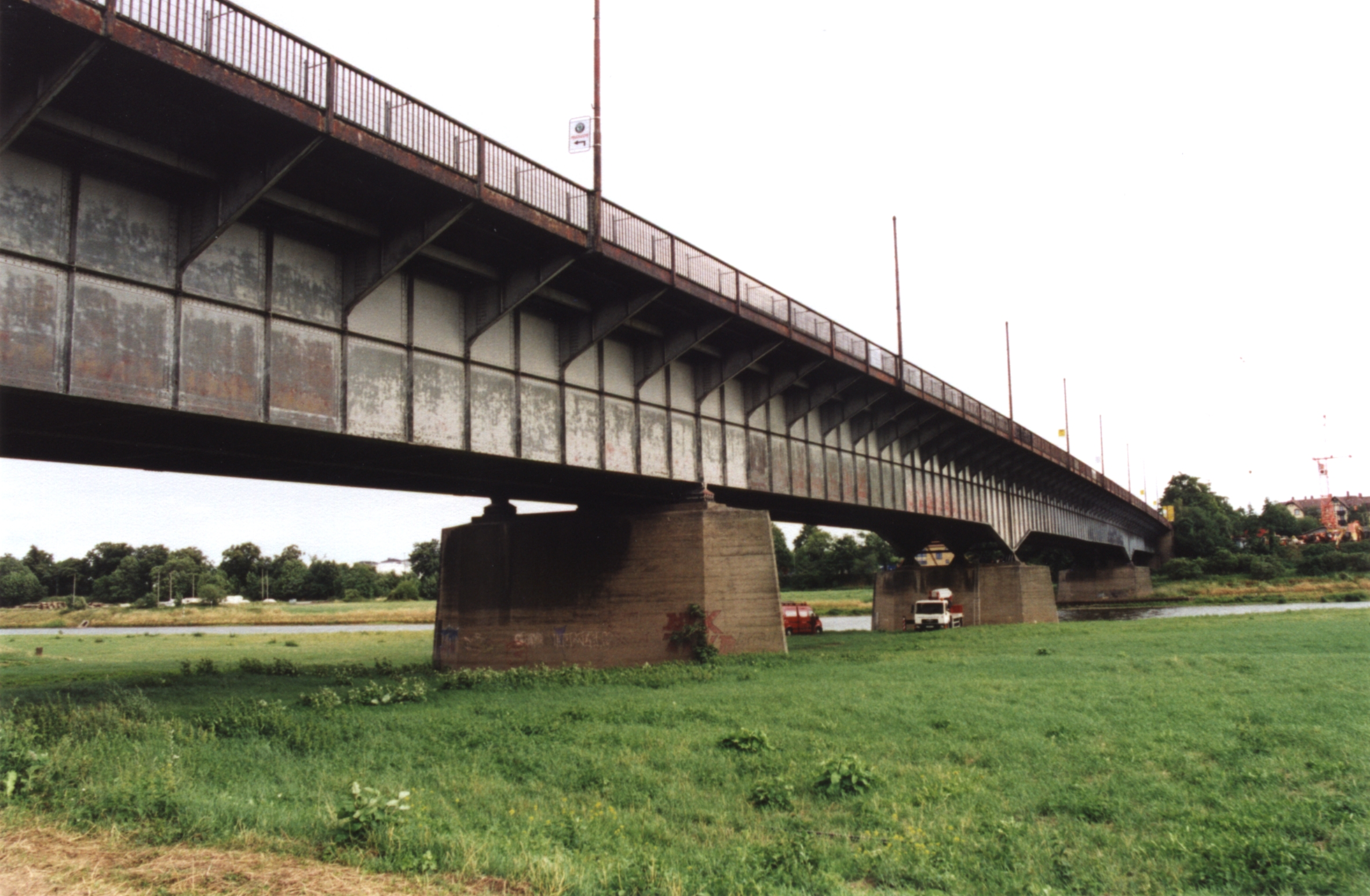 Die alte Flügelwegbrücke von 1930 im Jahre 2000